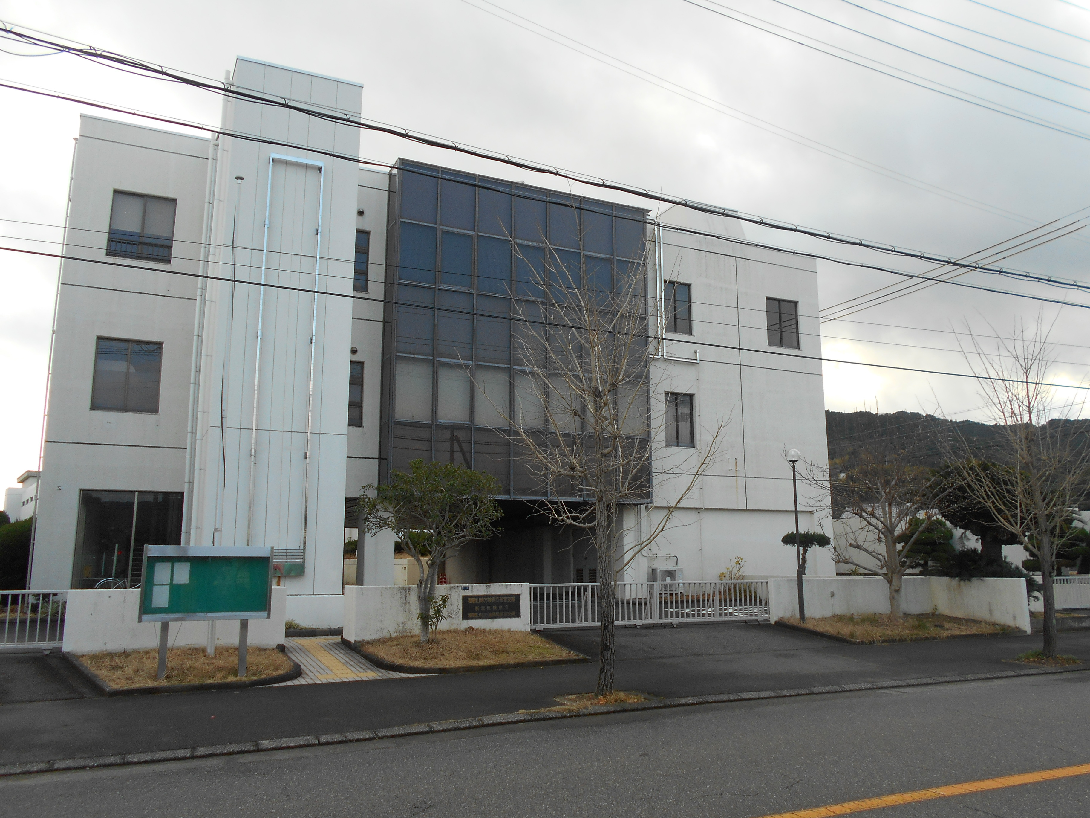 和歌山地方検察庁新宮支部 新宮区検察庁 和歌山地方法務局新宮支局